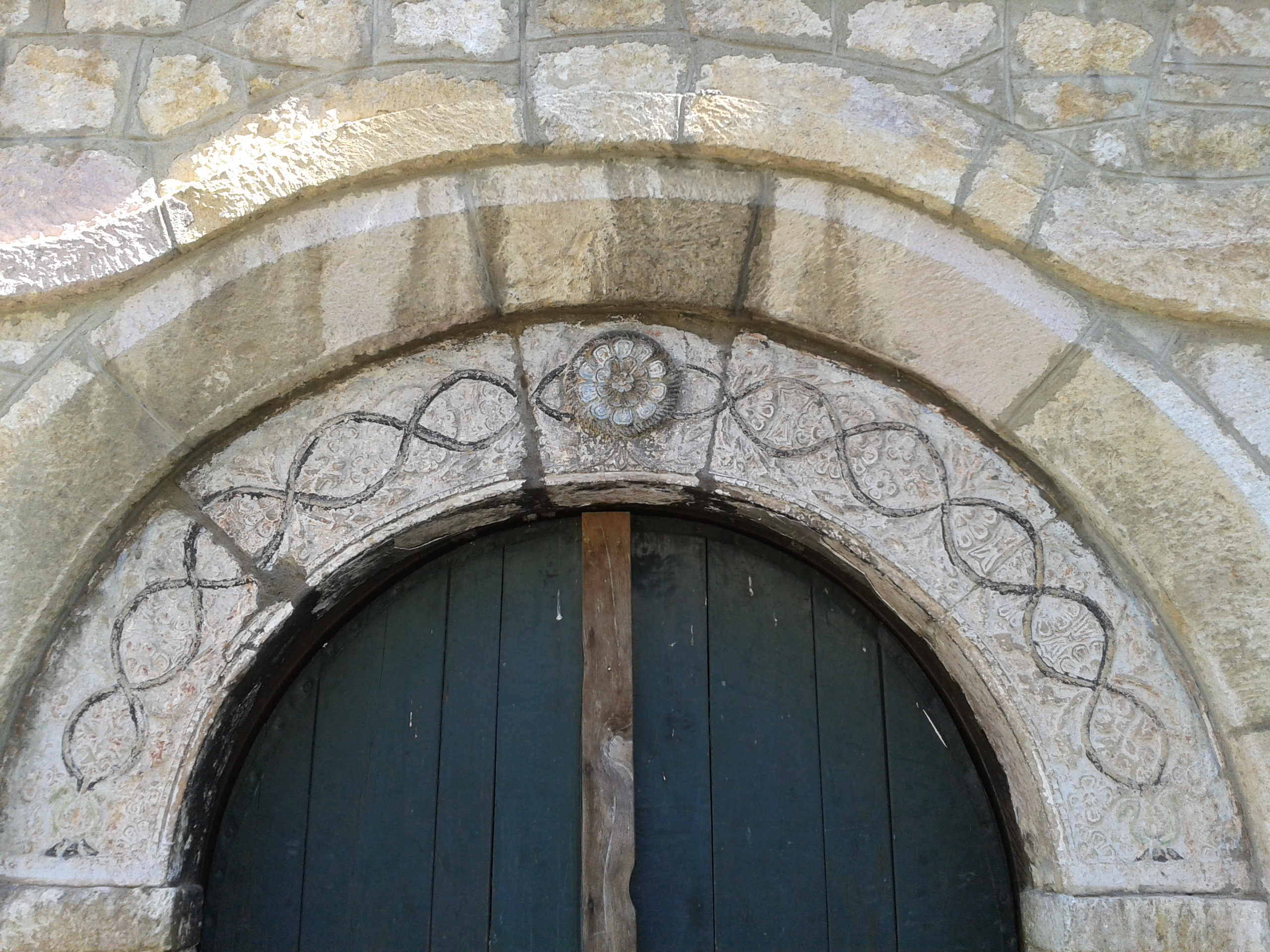 Српски (ћирилица): Црква у Јагњилу, Младеновац, Београд